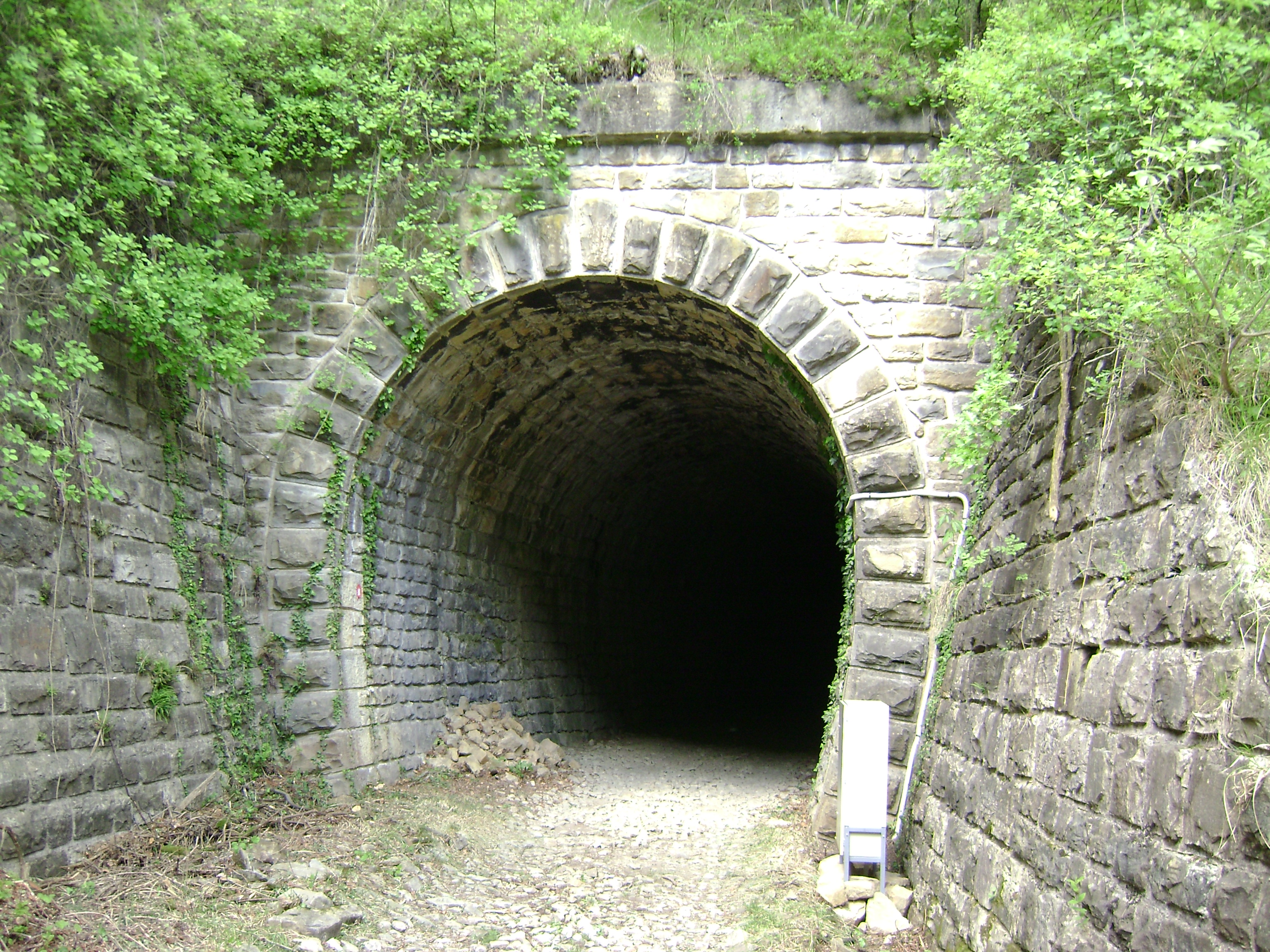 Ulaz u tunel "Freski" na ukinutoj uskotračnoj pruti "Parenzana"